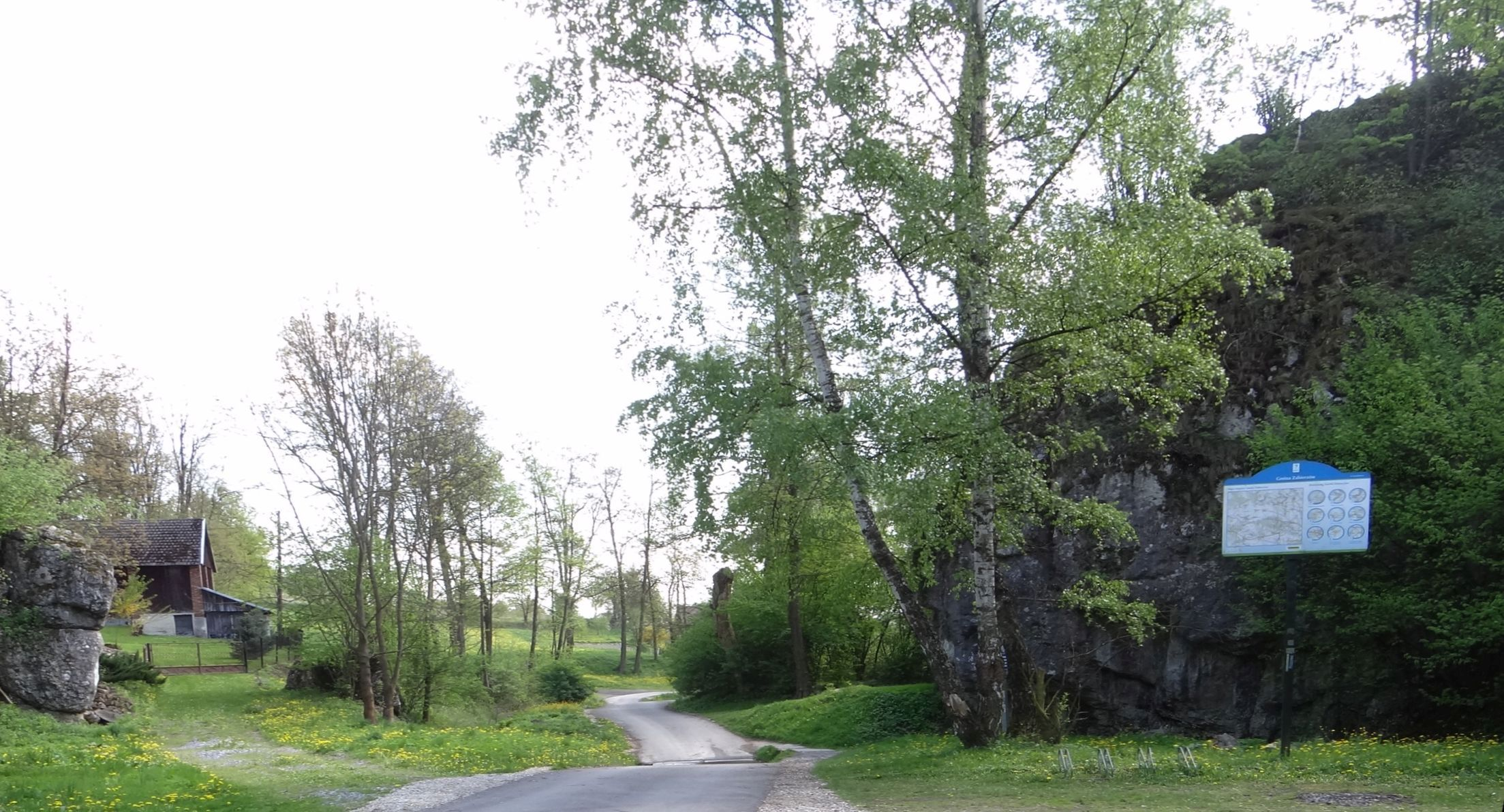 Wylot Doliny Kobylańskiej. Po prawej stronie Ponad Gnój Turnia